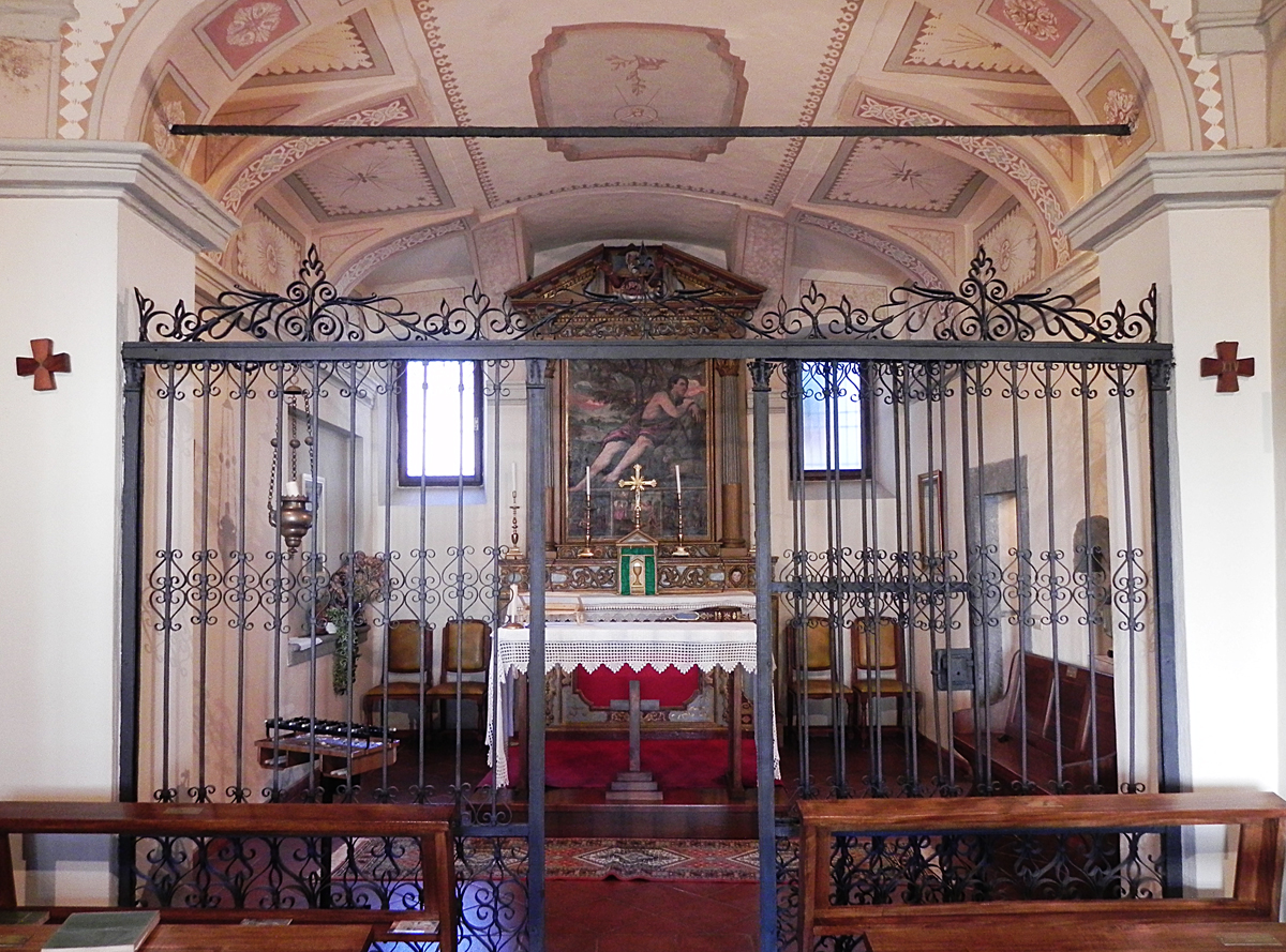 Visione interna della chiesa di San Giovanni a Gorno